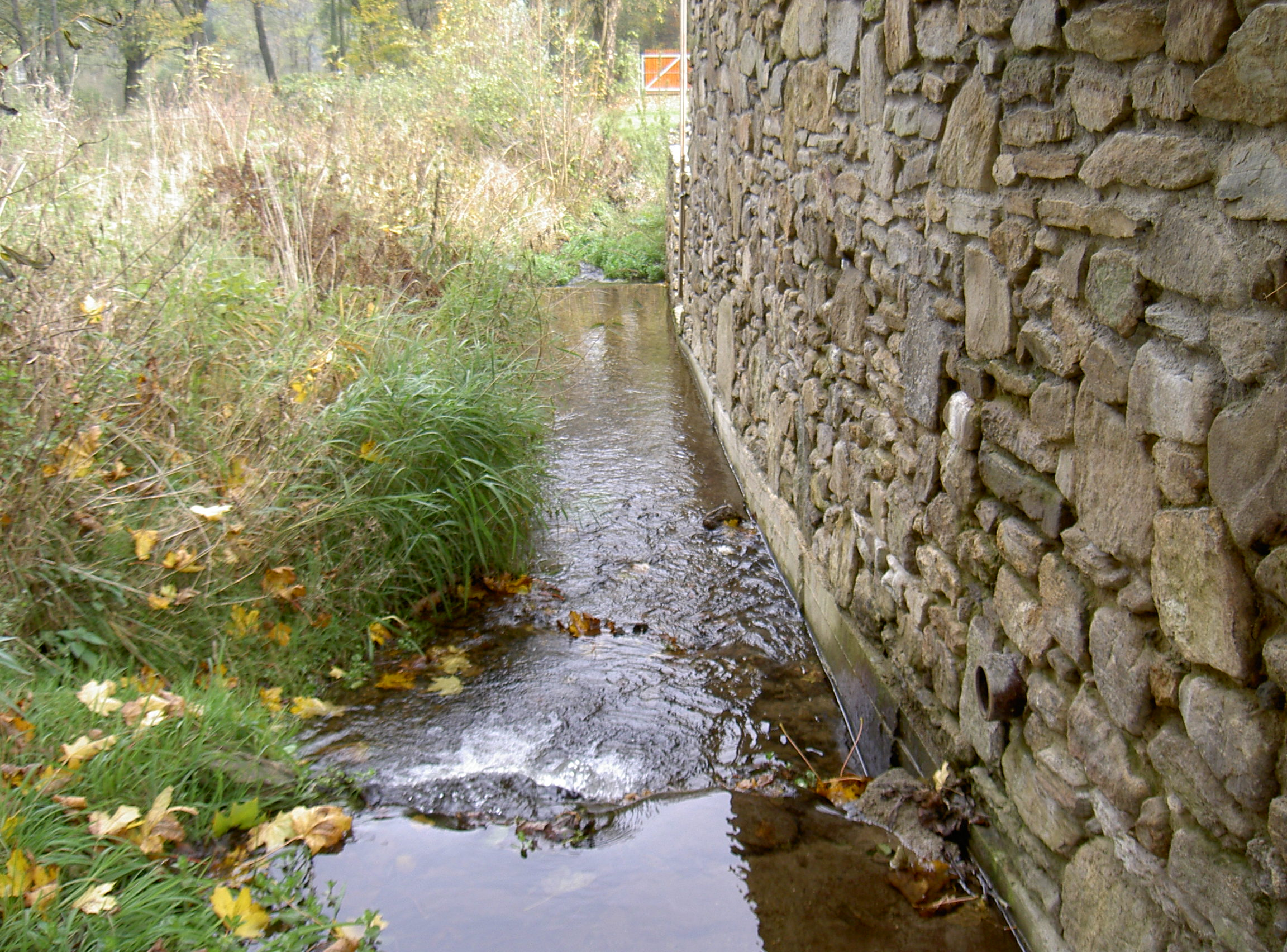 Pivoň Pivoňka